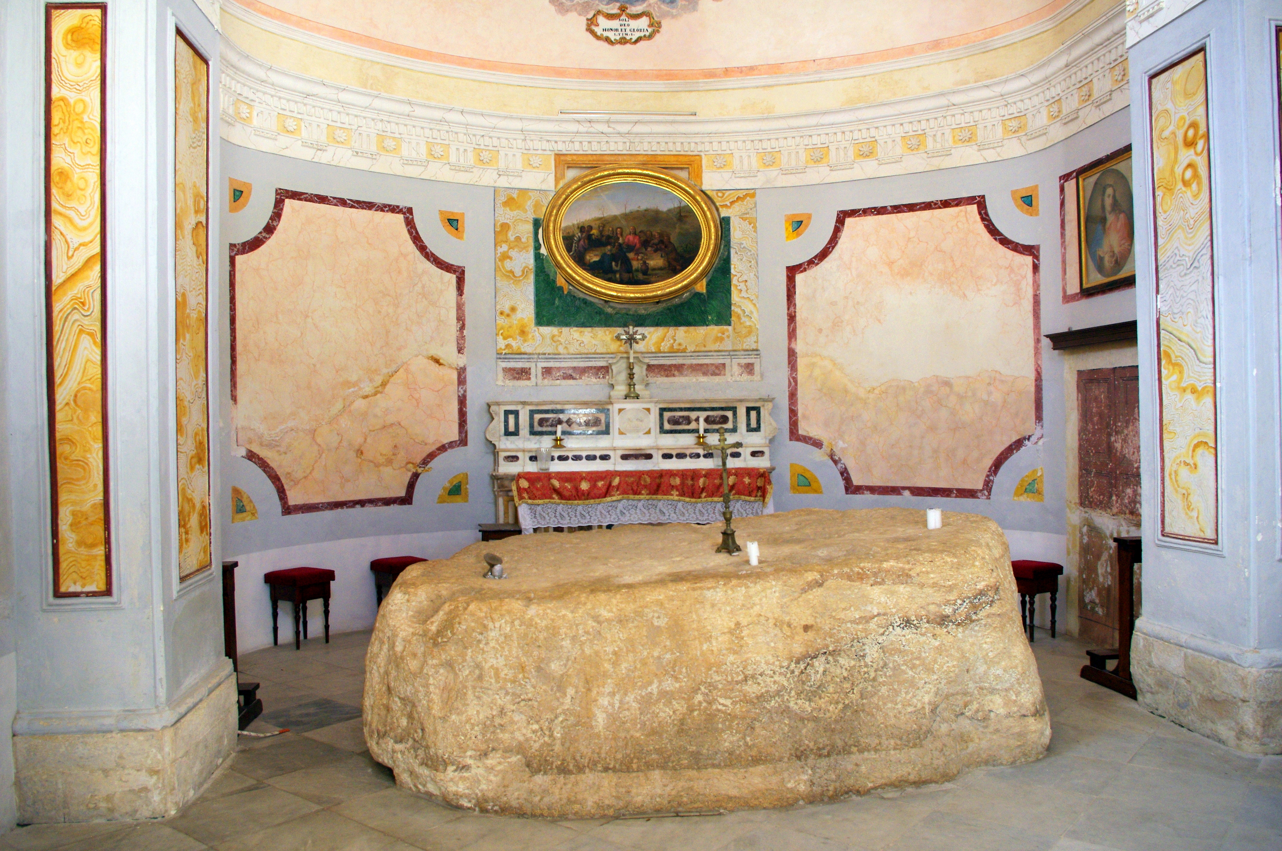 V kostole